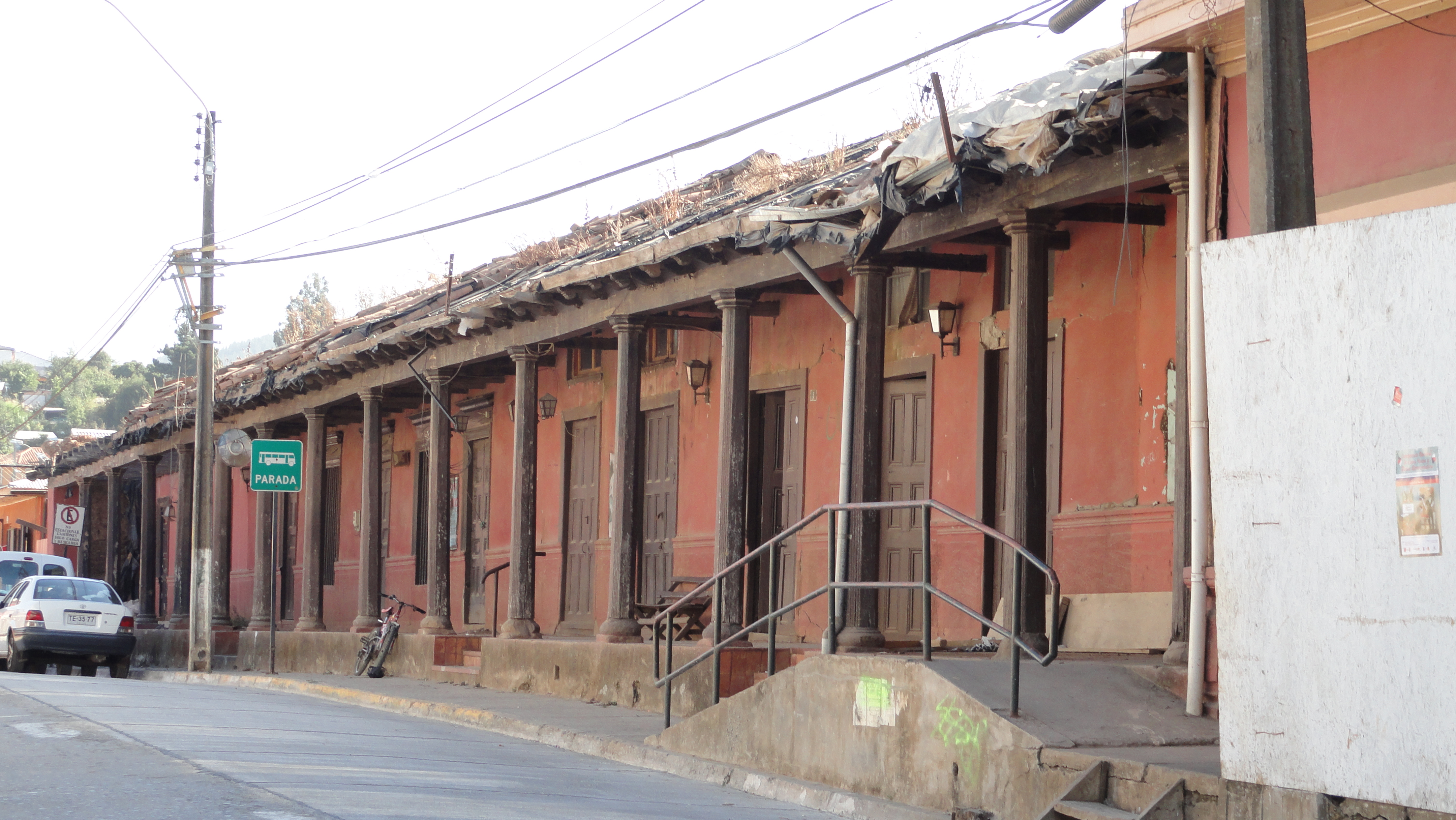 Verano 2013. Recorriendo Curepto